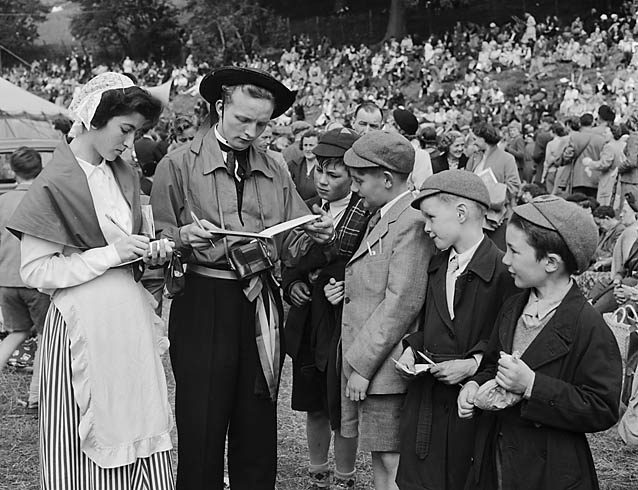 Teitl Cymraeg/Welsh title: Eisteddfod Gerddorol Ryngwladol Llangollen Ffotograffydd/Photographer: Geoff Charles (1909-2002) Dyddiad/Date: July 10, 1954 Cyfrwng/Medium: Negydd ffilm / Film negative Cyfeiriad/Reference: (gch06343) Rhif cofnod / Record no.: 3367771 Rhagor o wybodaeth am gasgliad Geoff Charles yn Llyfrgell Genedlaethol Cymru More information about the Geoff Charles Collection at the National Library of Wales Mae ffotograffau Geoff Charles hefyd yn rhan o Broject Europeana Libraries Geoff Charles' photographs also form part of the Europeana Libraries Project